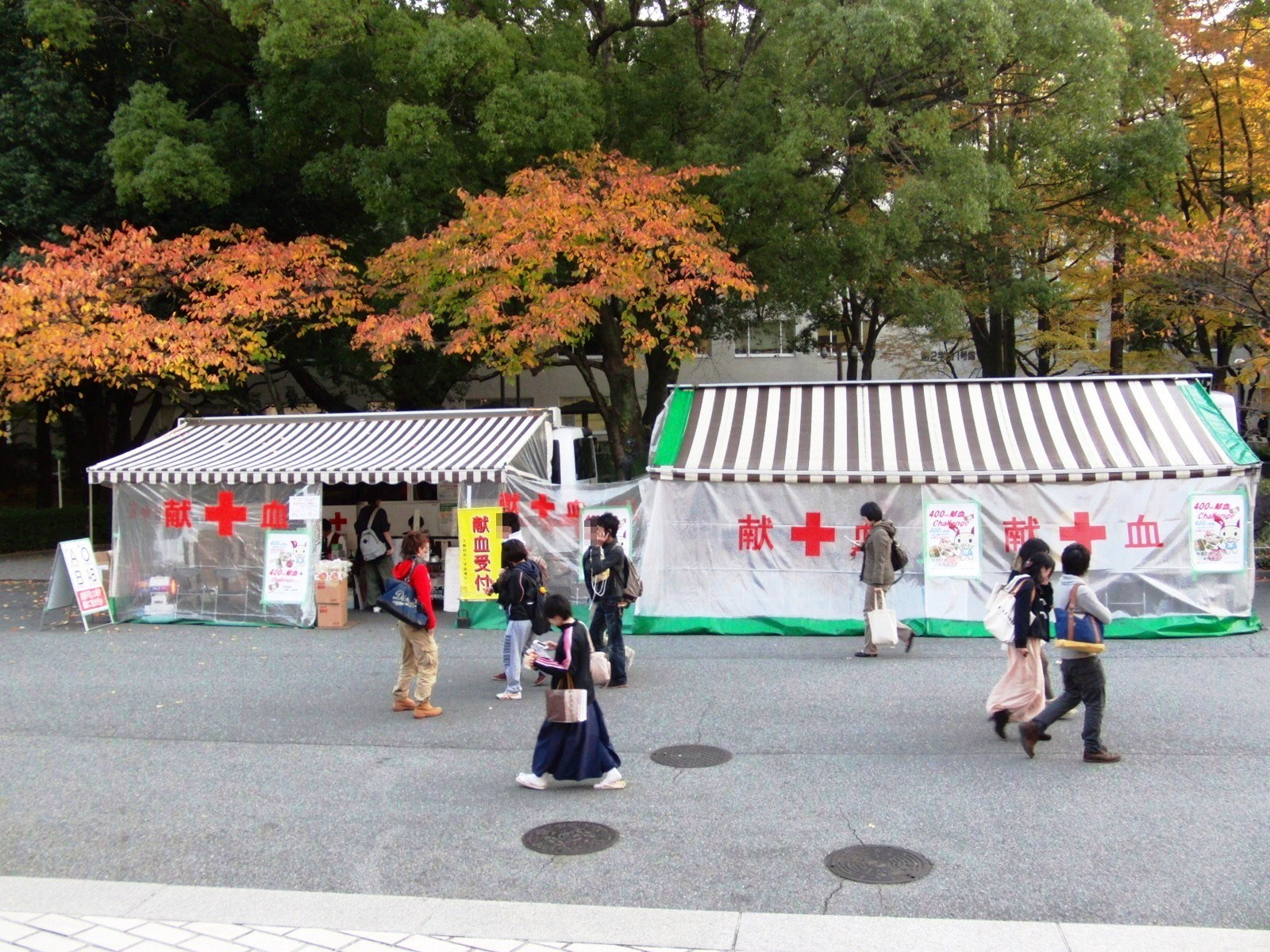 関西大学構内での献血活動を撮影